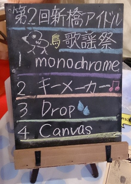 amiinaセトリボード(20150215(1))